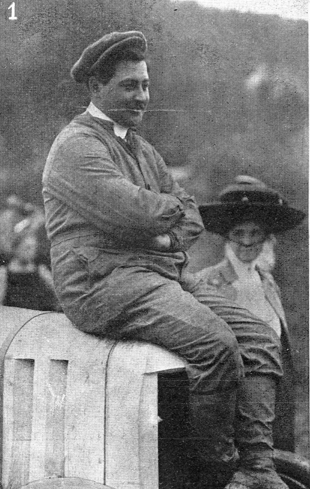 Alexander Josef hrabě Kolowrat-Krakowský